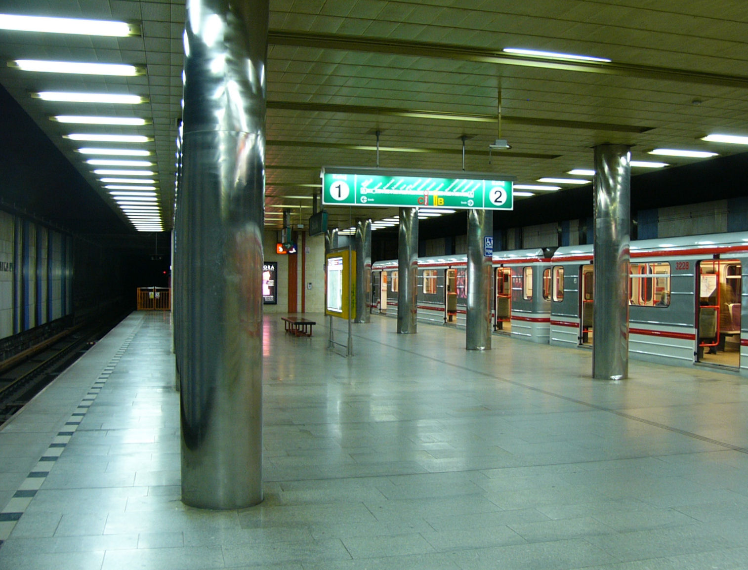 Metro station Skalka in Prague - Stanice pražského Skalka